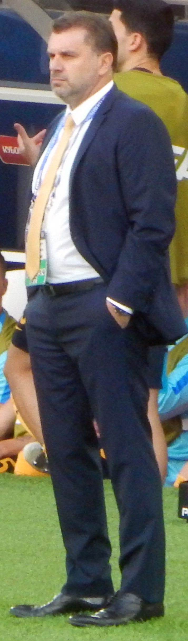 Тренер Австралийцев Ангелос Постекоглу Матч Чили – Австралия